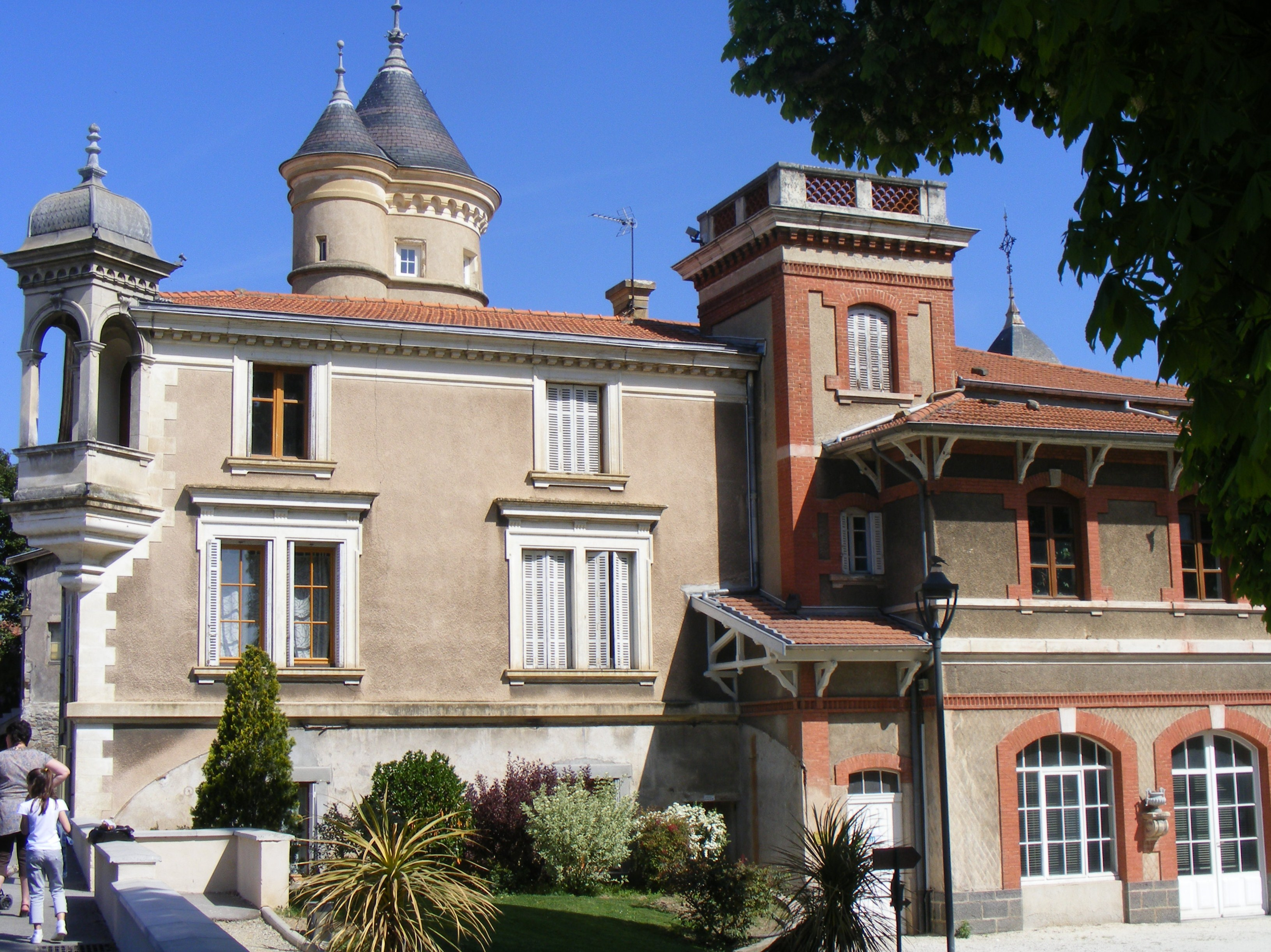 Château Souchon , mairie